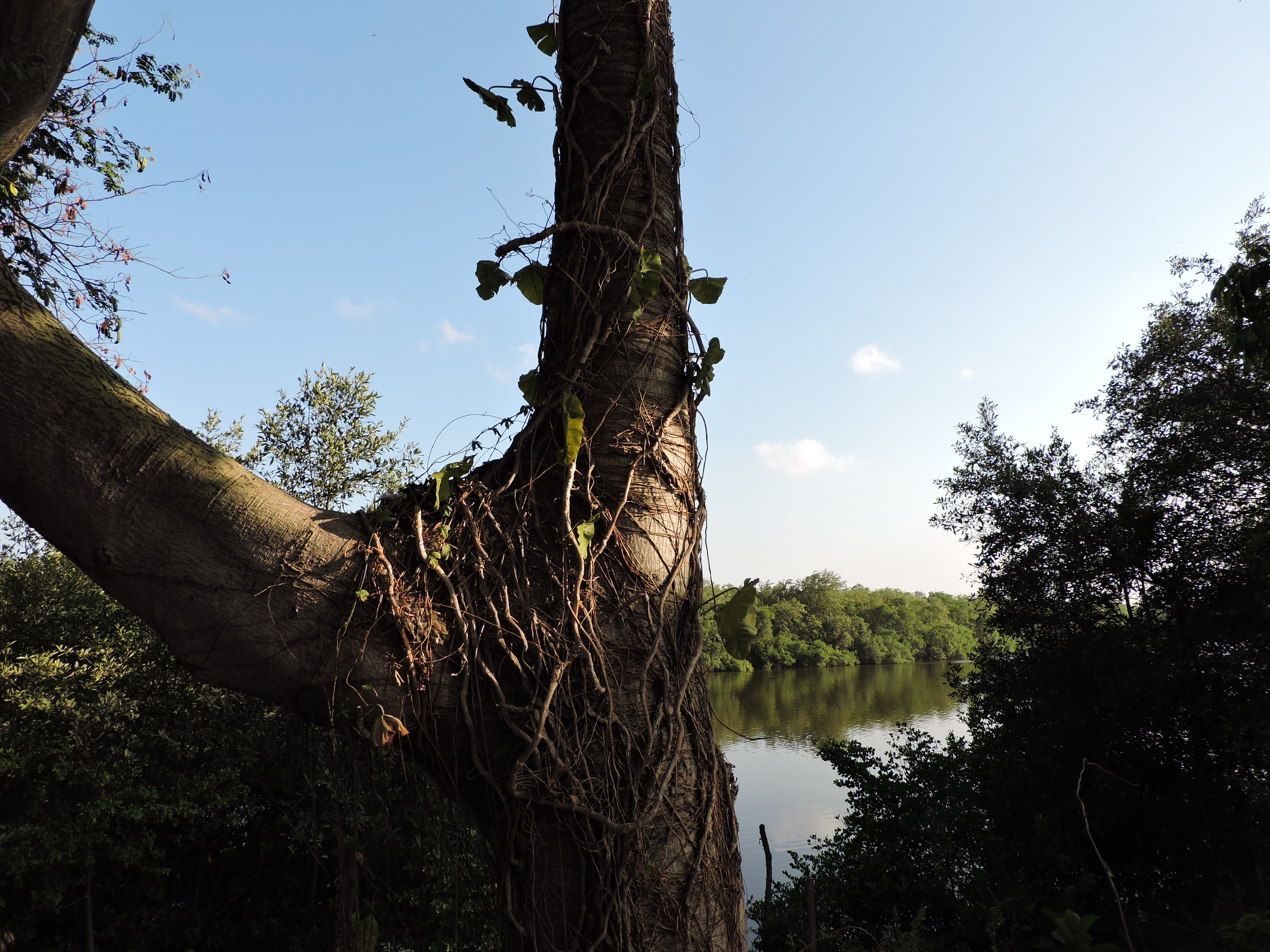 Fotografia tiradas no bacanga